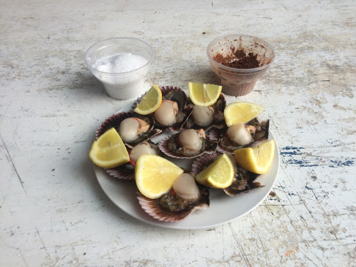 Ostiones, sal, limón y merkén.